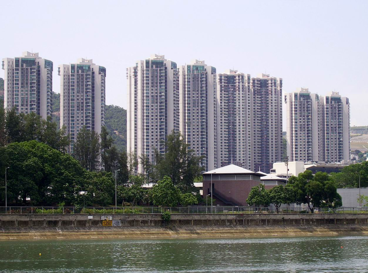 中文（香港）: 駿景園